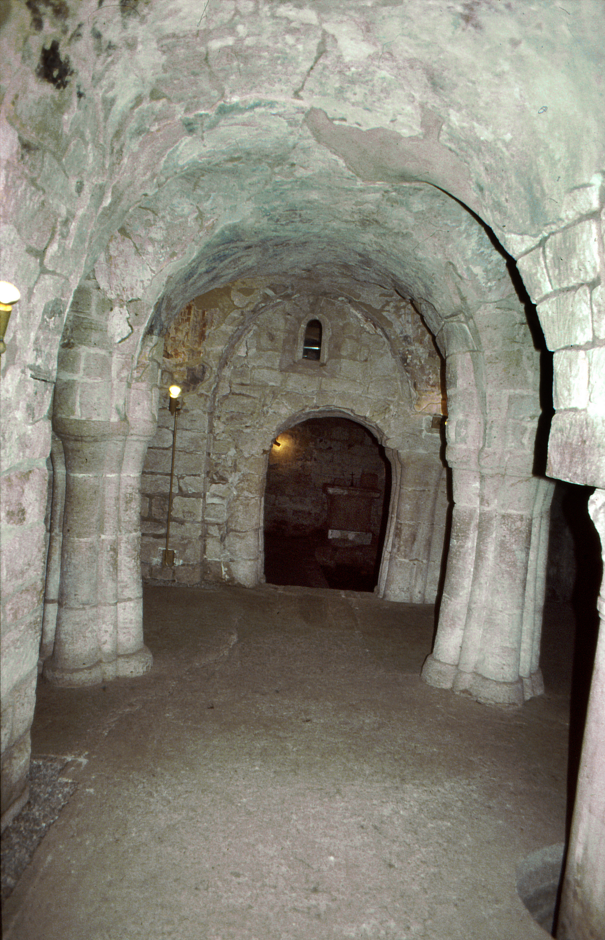 Feldebrő, altemplom, Románkori művészet